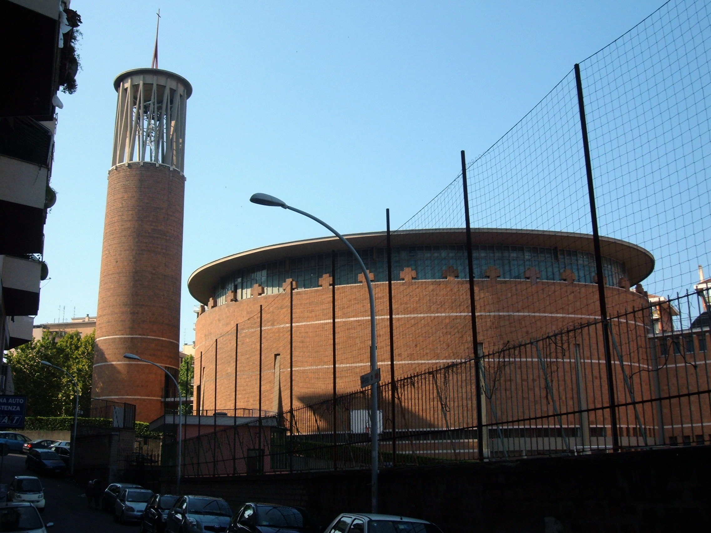 Chiesa di Gesù Divino Lavoratore, a Roma, nel quartiere Portuense.